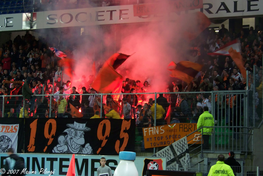 Match de Foot Rennes - Lorient, 23 Février 2008, Ligue 1 Saison 2007-2008